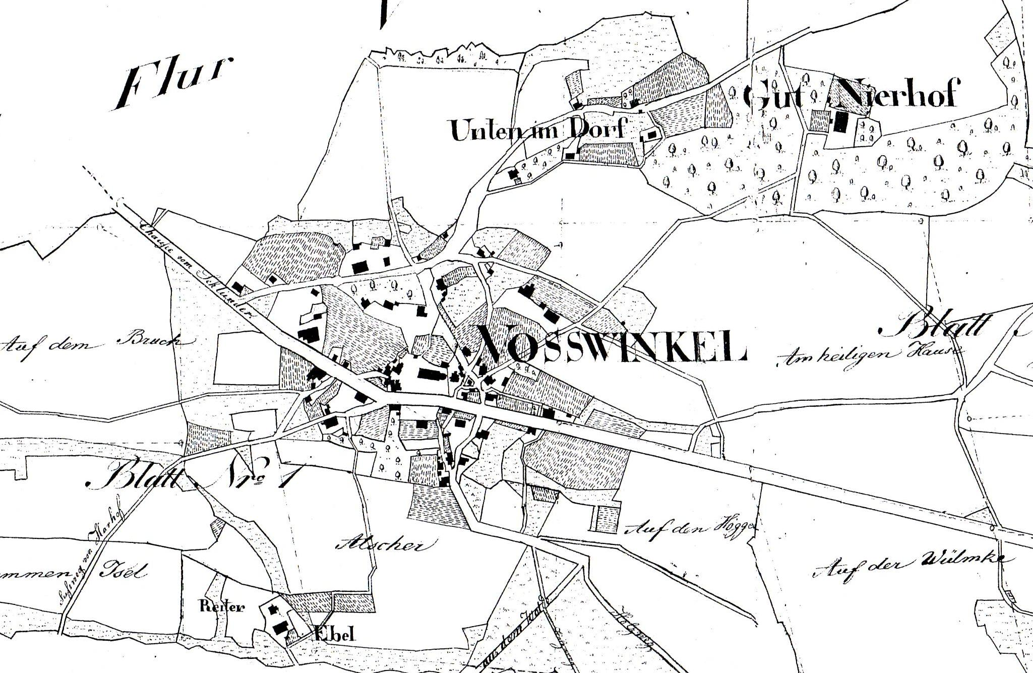 Landkarte von Voßwinkel um 1827